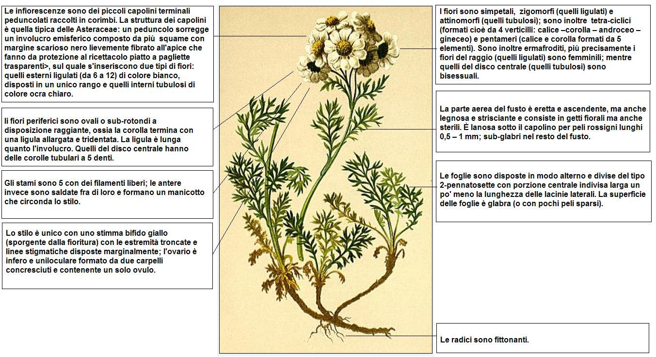 Achillea atrata Hartinger DESC